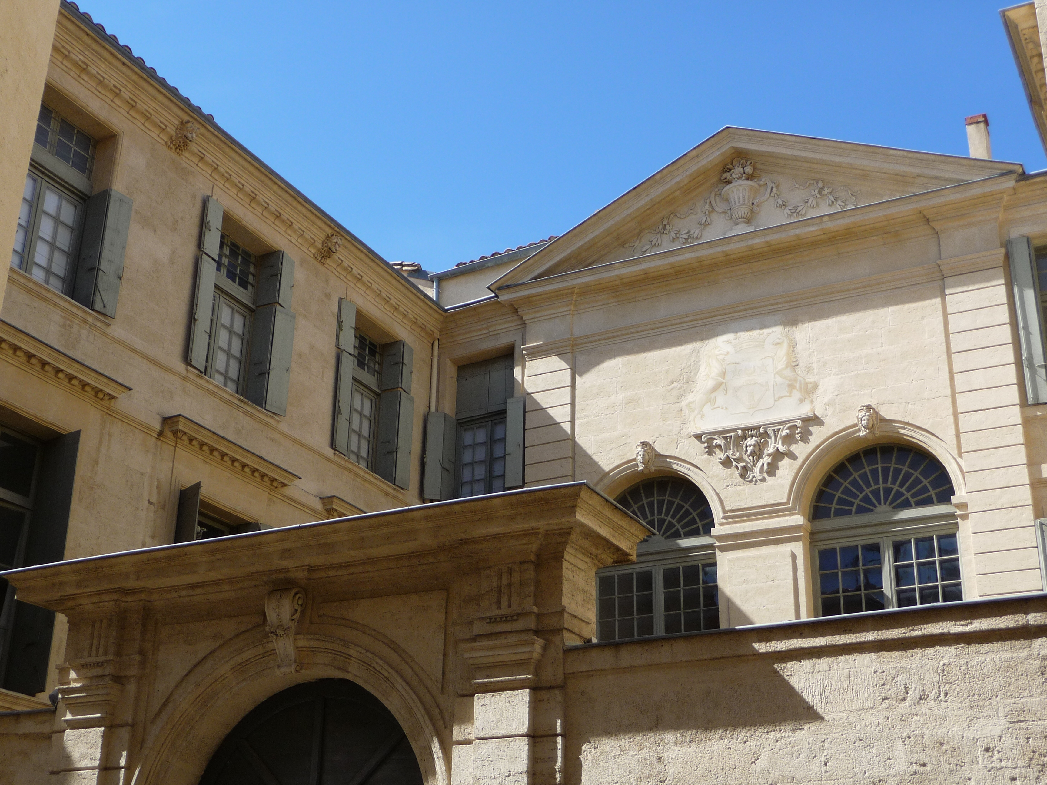 Vista general de la façana de l'Hôtel de Lunas (Montpeller)